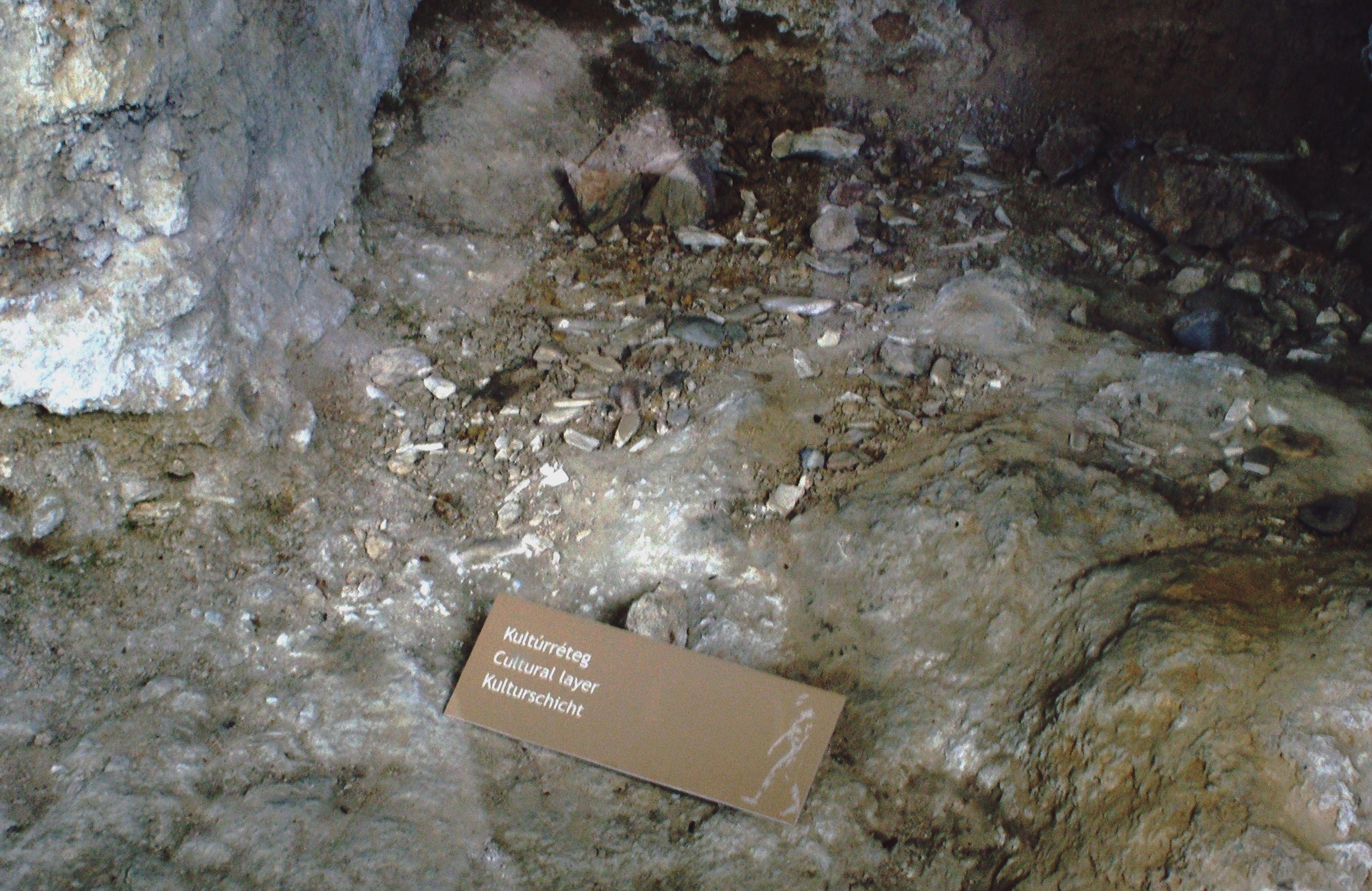 Őskőkori kultúrréteg (Vértesszőlős Őstelep)